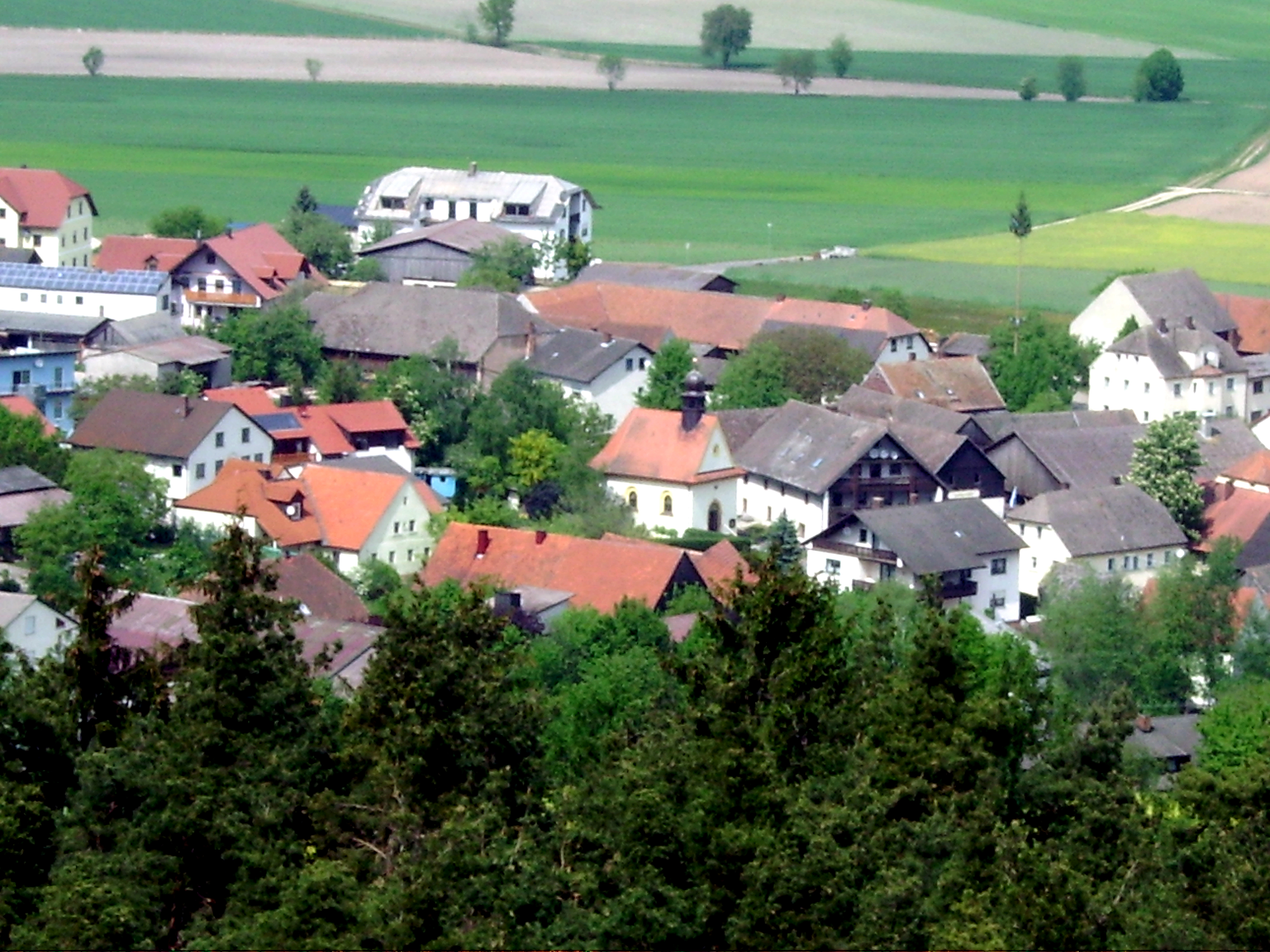 Massenricht Ortskern vom Rödlasturm aus